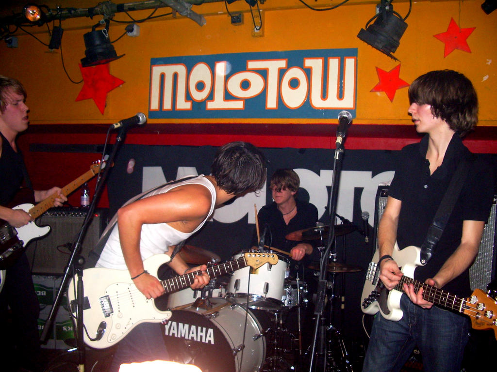 Molotov Jive